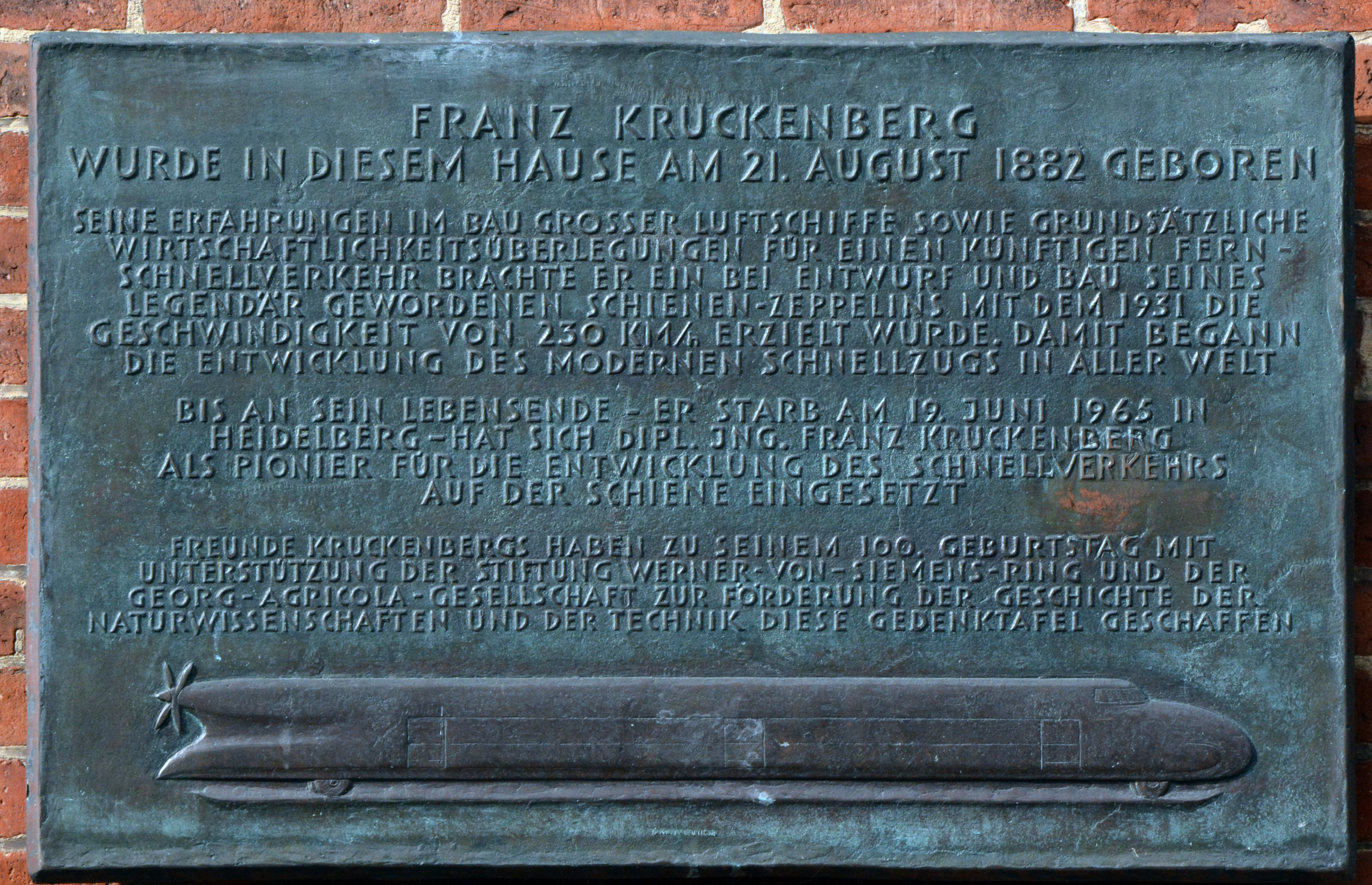 Die Gedenktafel für Franz Kruckenberg in Uetersen, an der westlichen Route des Ochsenweg